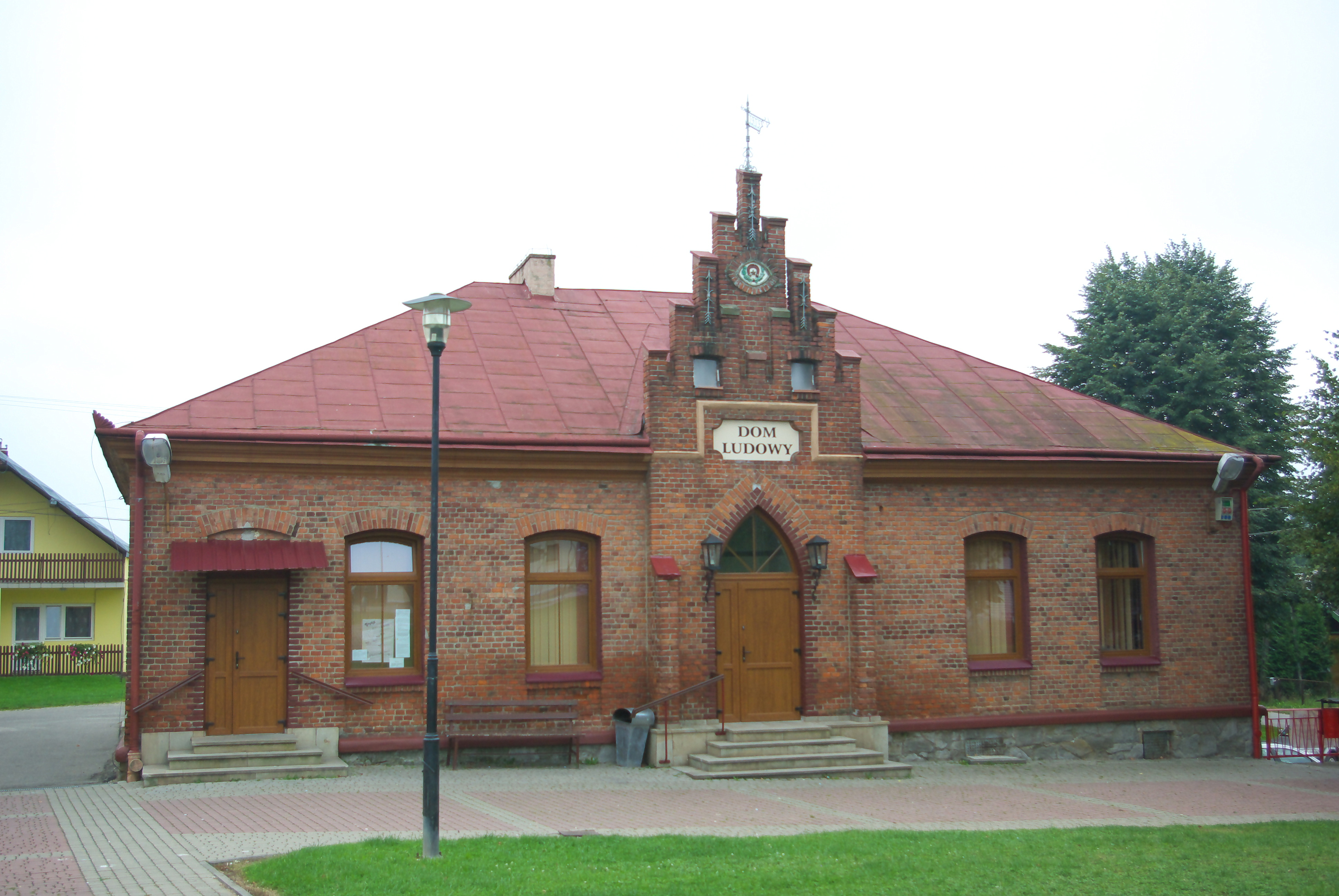 Dom Ludowy w Jaćmierzu